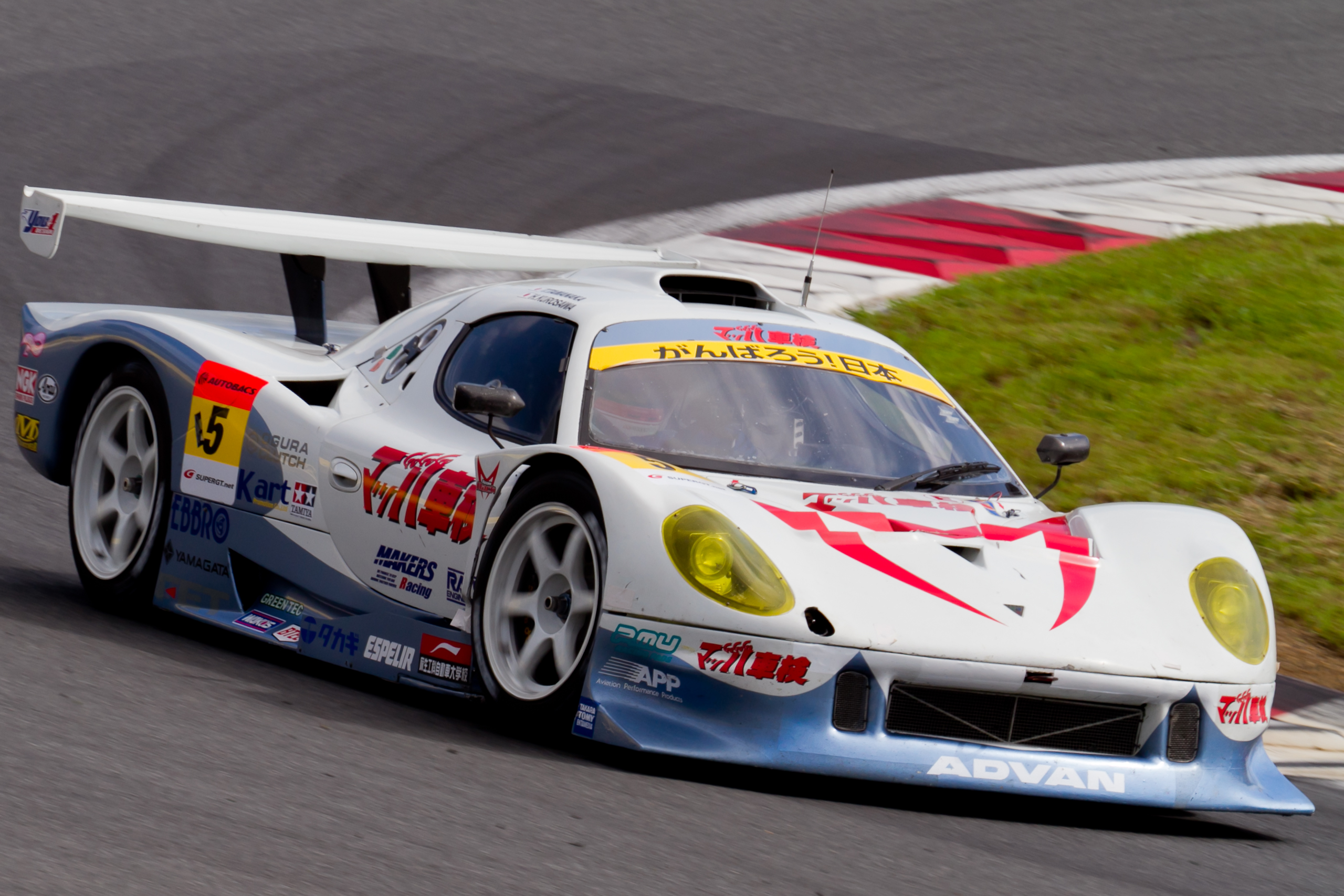 Super GT 2011 Rd.6 Fuji GT 250km: Haruki Kurosawa (Team Mach) driving the Vemac RD320R.